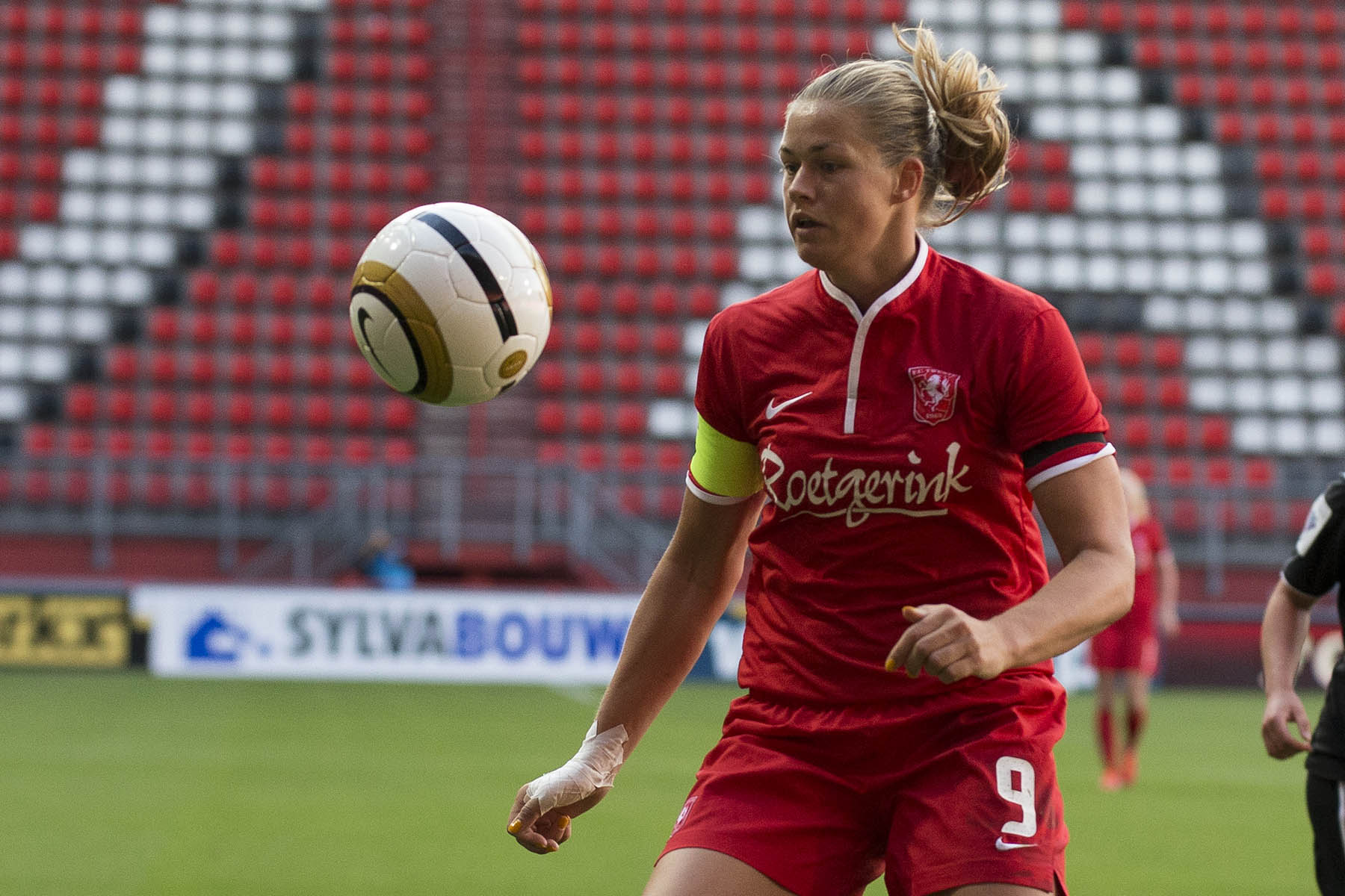 Anouk Dekker.